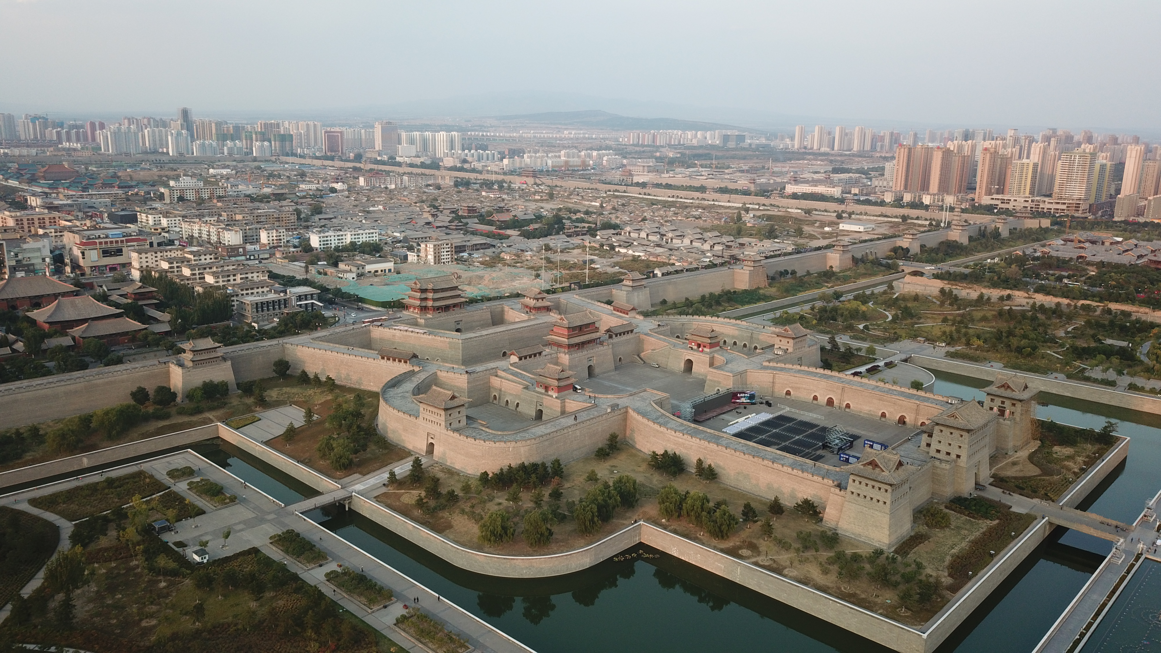 中文（中国大陆）: 大同市老城区南城门及瓮城、护城河。大同城墙为复建，并非历史遗留。